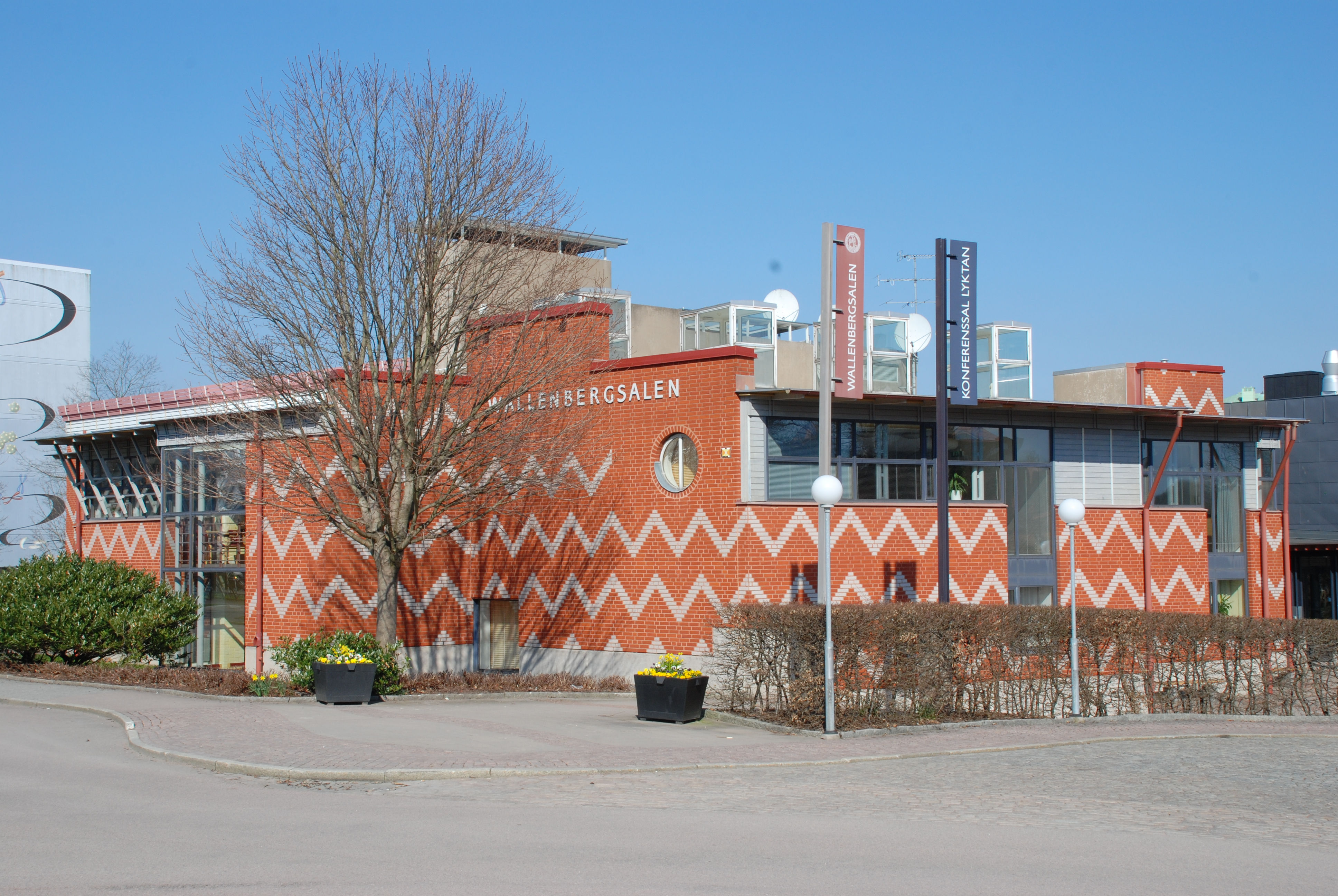 Wallenbergsalen - Medicinaregatan 20 på Medicinareberget i stadsdelen Änggården i Göteborg.